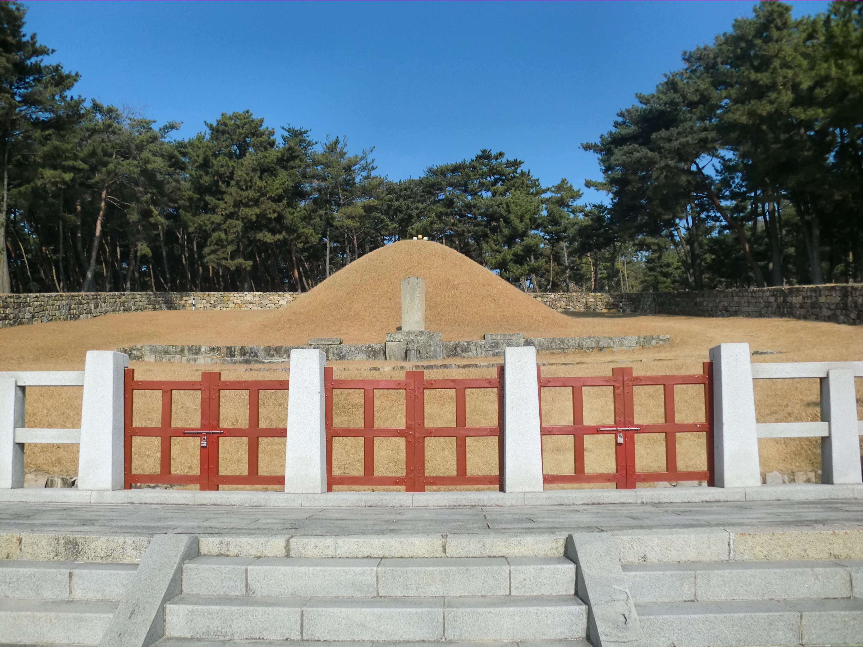 수로왕비릉